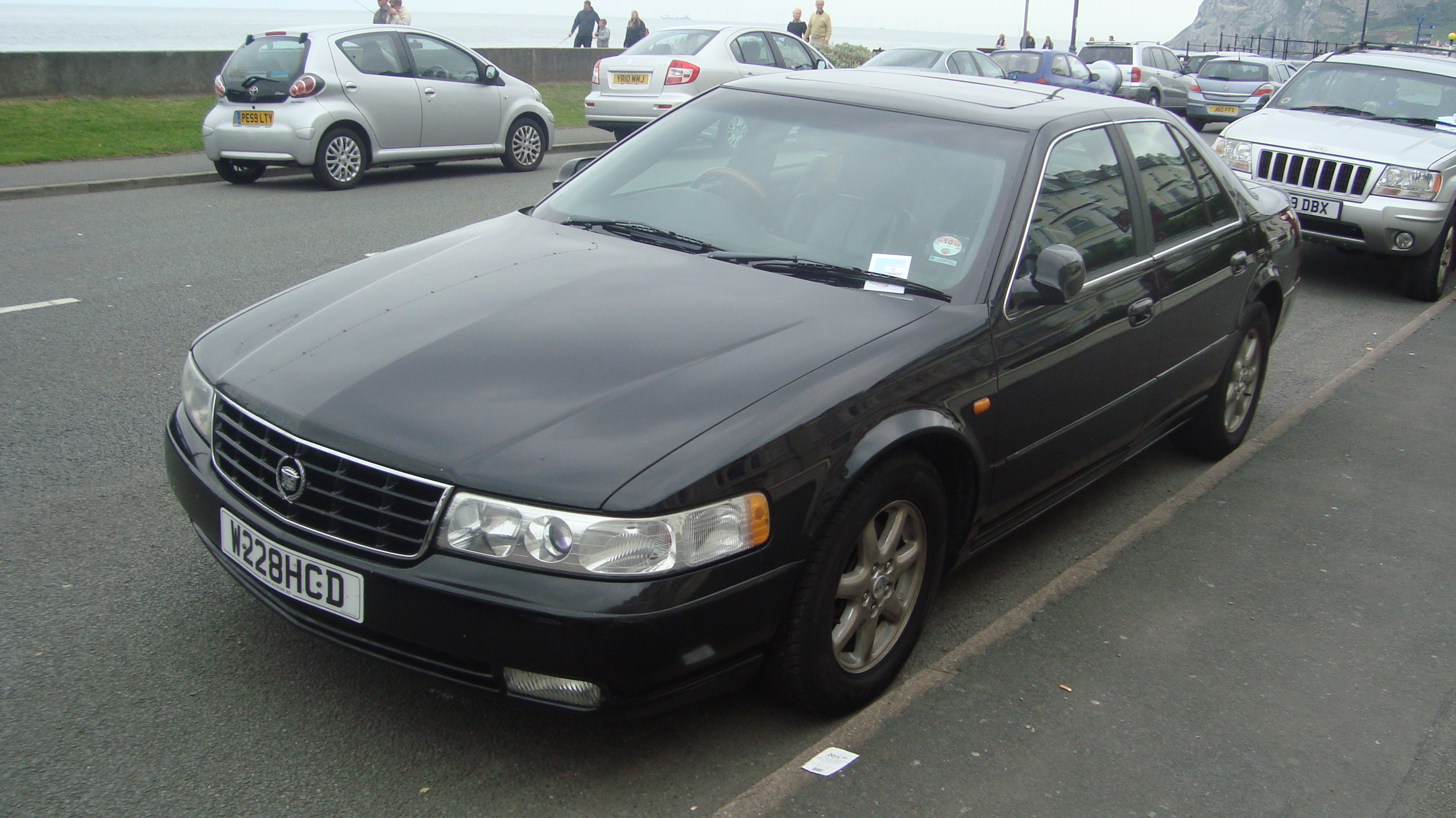 2000 Cadillac Seville STS